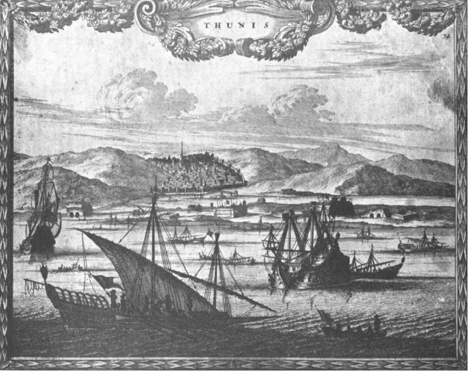 Tunis (Reproduction d'une gravure de 1690), Tunisie